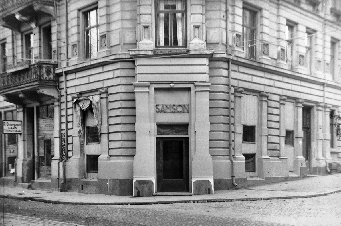 Samson bakeriutsalg på hjørnet av Oscars gate 81